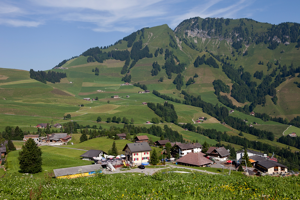 Ausflugsziel Wirzweli (ob Dallenwil) im Sommer wie im Winter